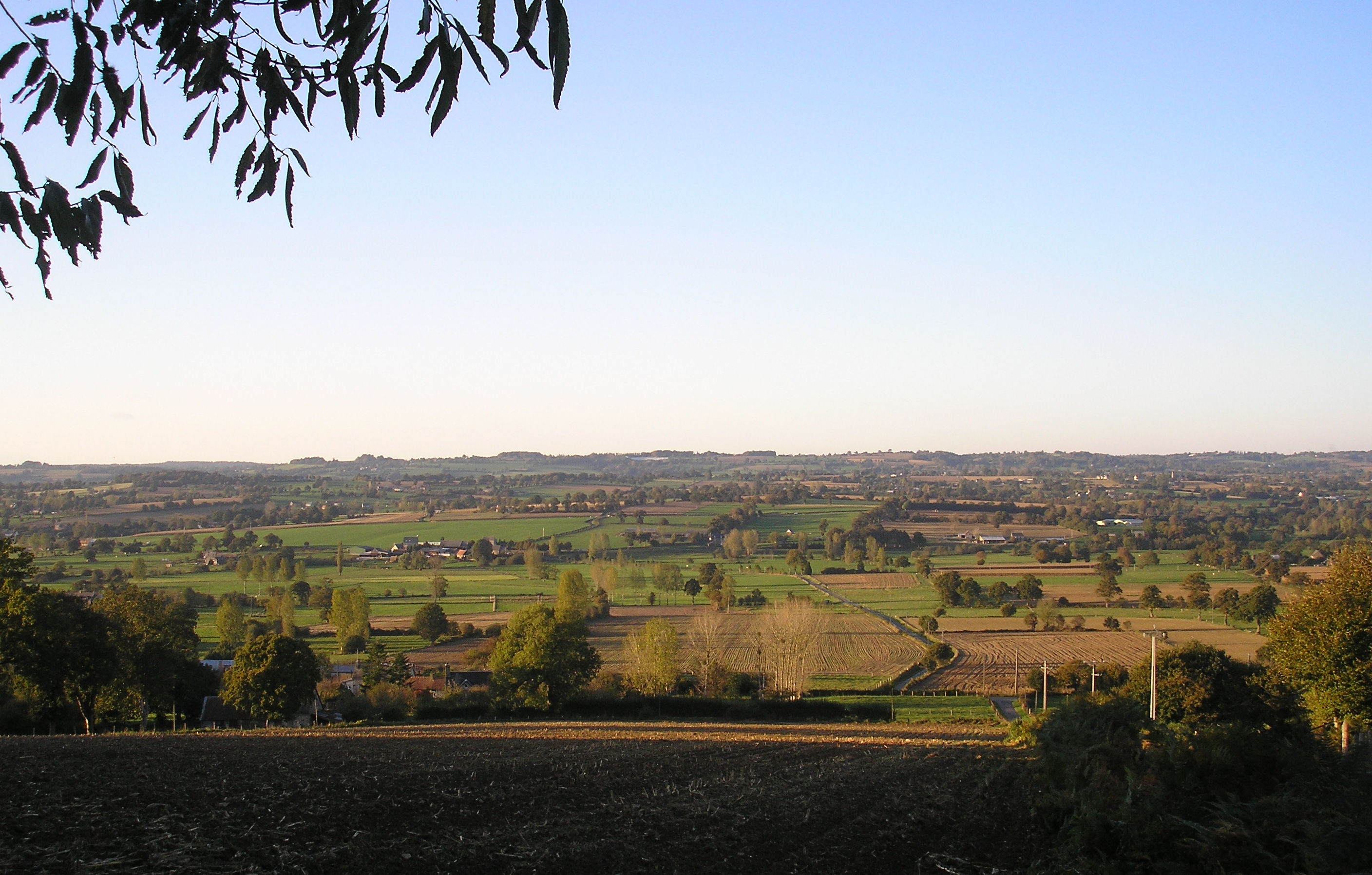 Vernix (Normandie, France). Le site de la commune vu du territoire du Petit-Celland. Le bourg est au centre gauche de l'image.